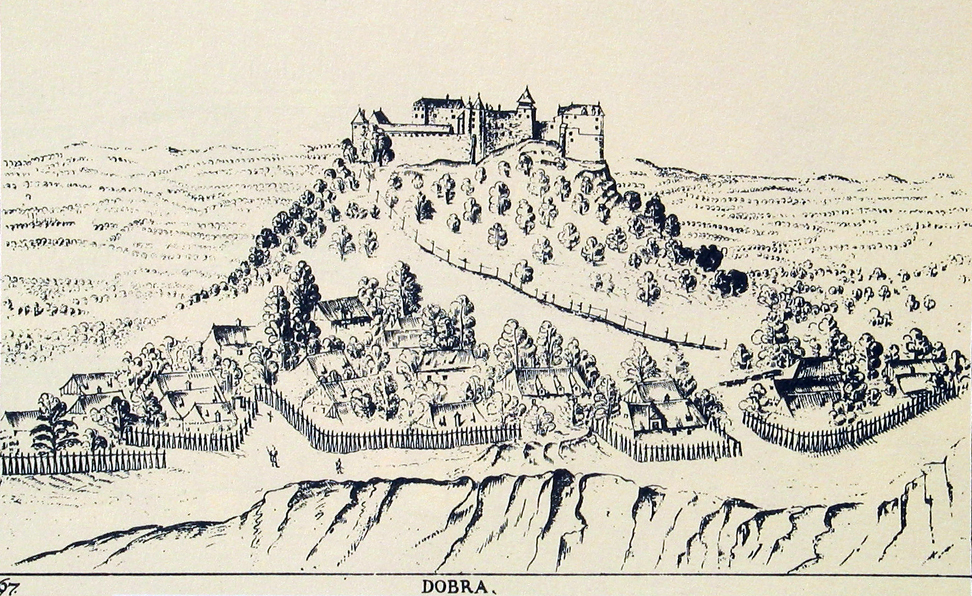 Neuhaus am Klausenbach im 17. Jahrhundert, Lavierte Federzeichnung